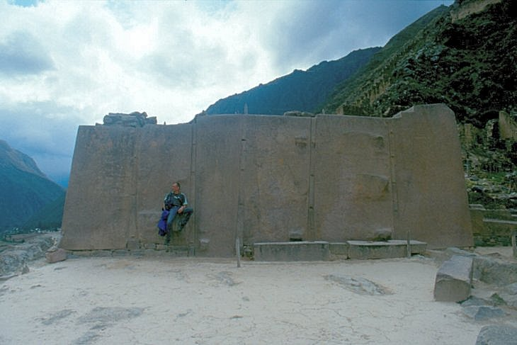 Ollantaytambo - Monolithen